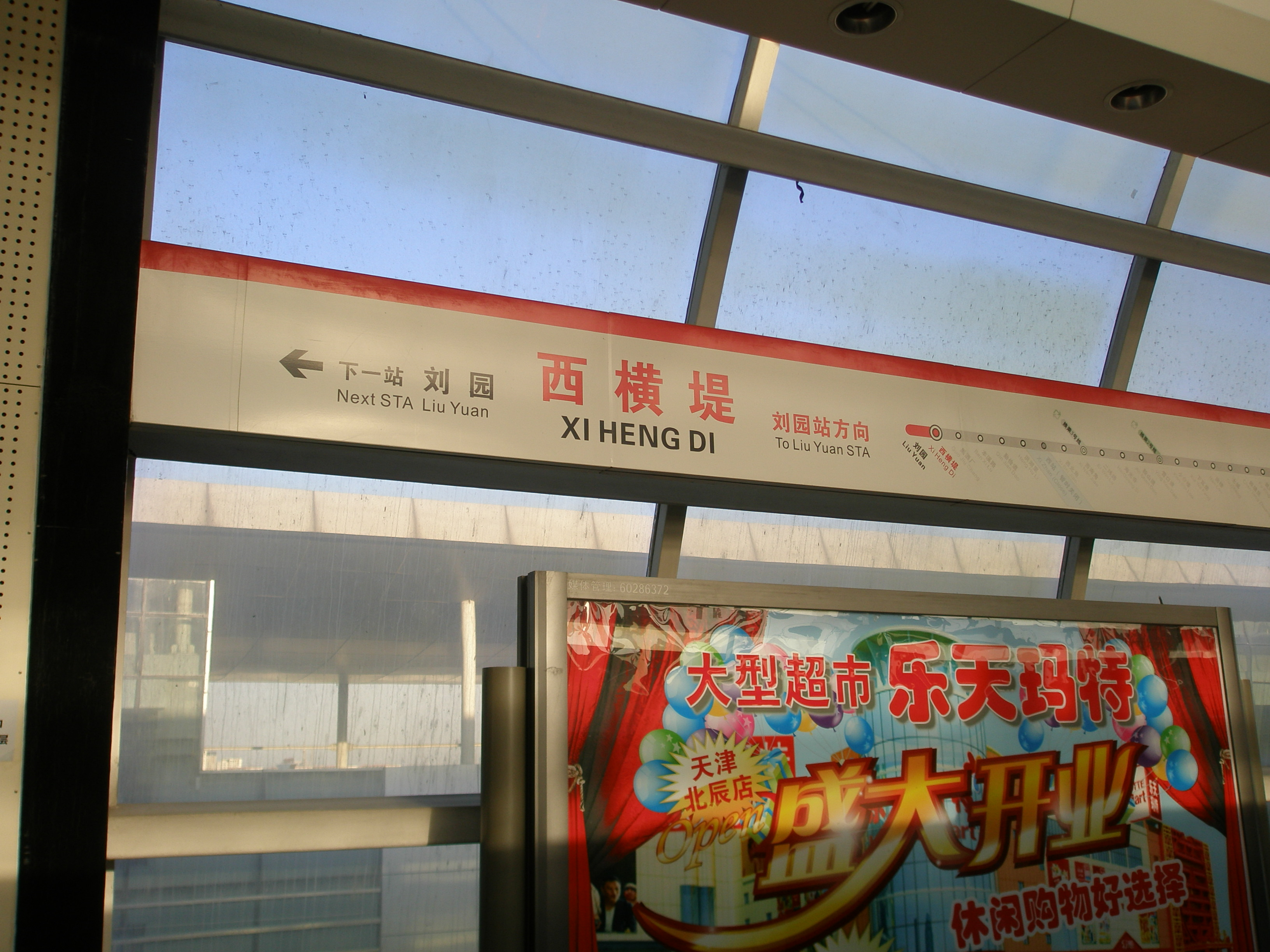 天津地铁一号线西横堤站